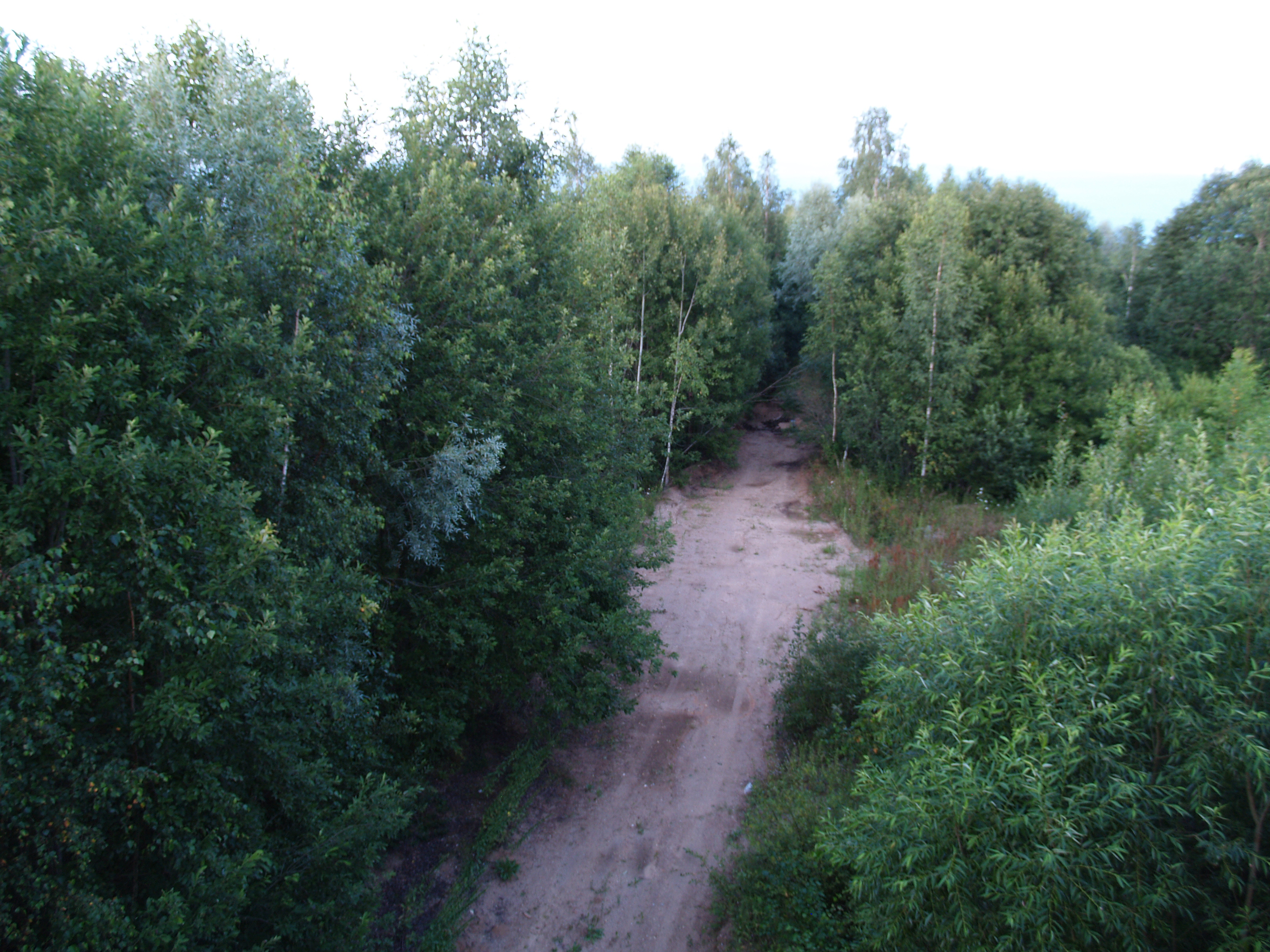 Endine Mõisaküla–Riia raudteeliin pildistatuna Ruhja lähedal raudteesillalt.